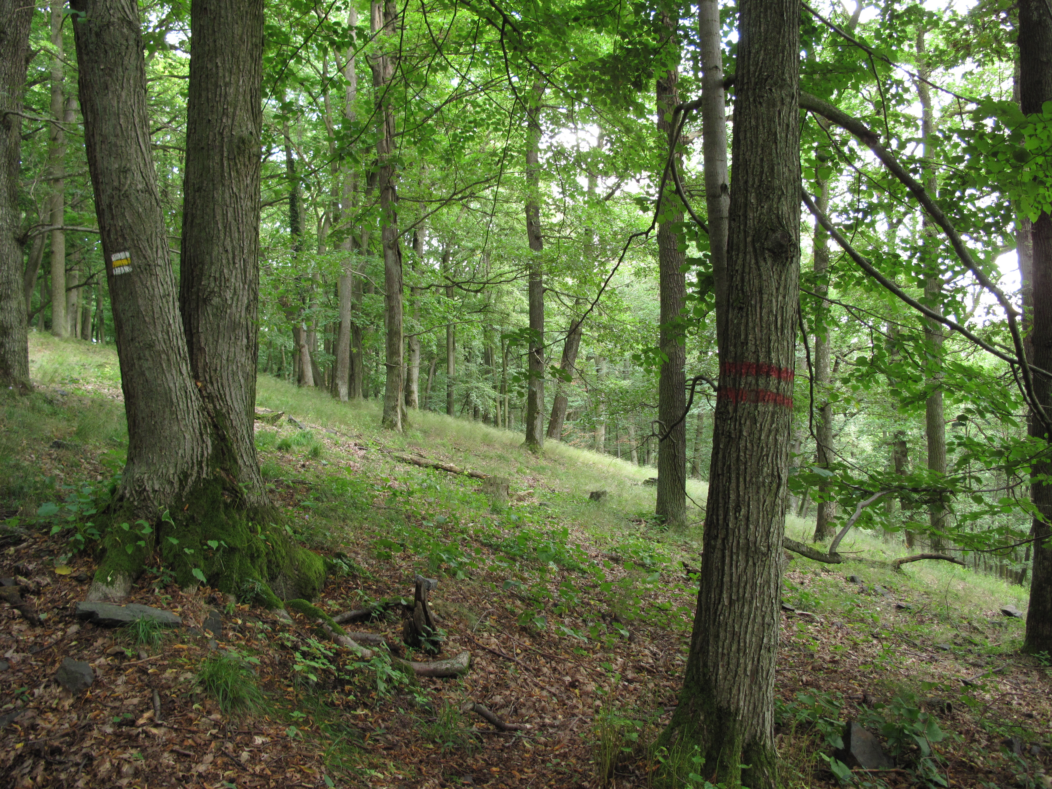 Přírodní rezervace Bělyšov, okres Klatovy, Česká republika.